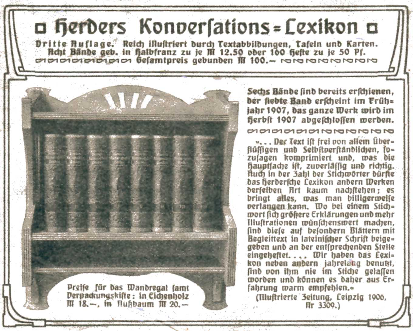 Werbungzettel für HERDERS KONVERSATIONS=LEXIKON von 1906 (Dritte Auflage) mit Wandregal (Beilage in anderen Verlagserzeugnissen)